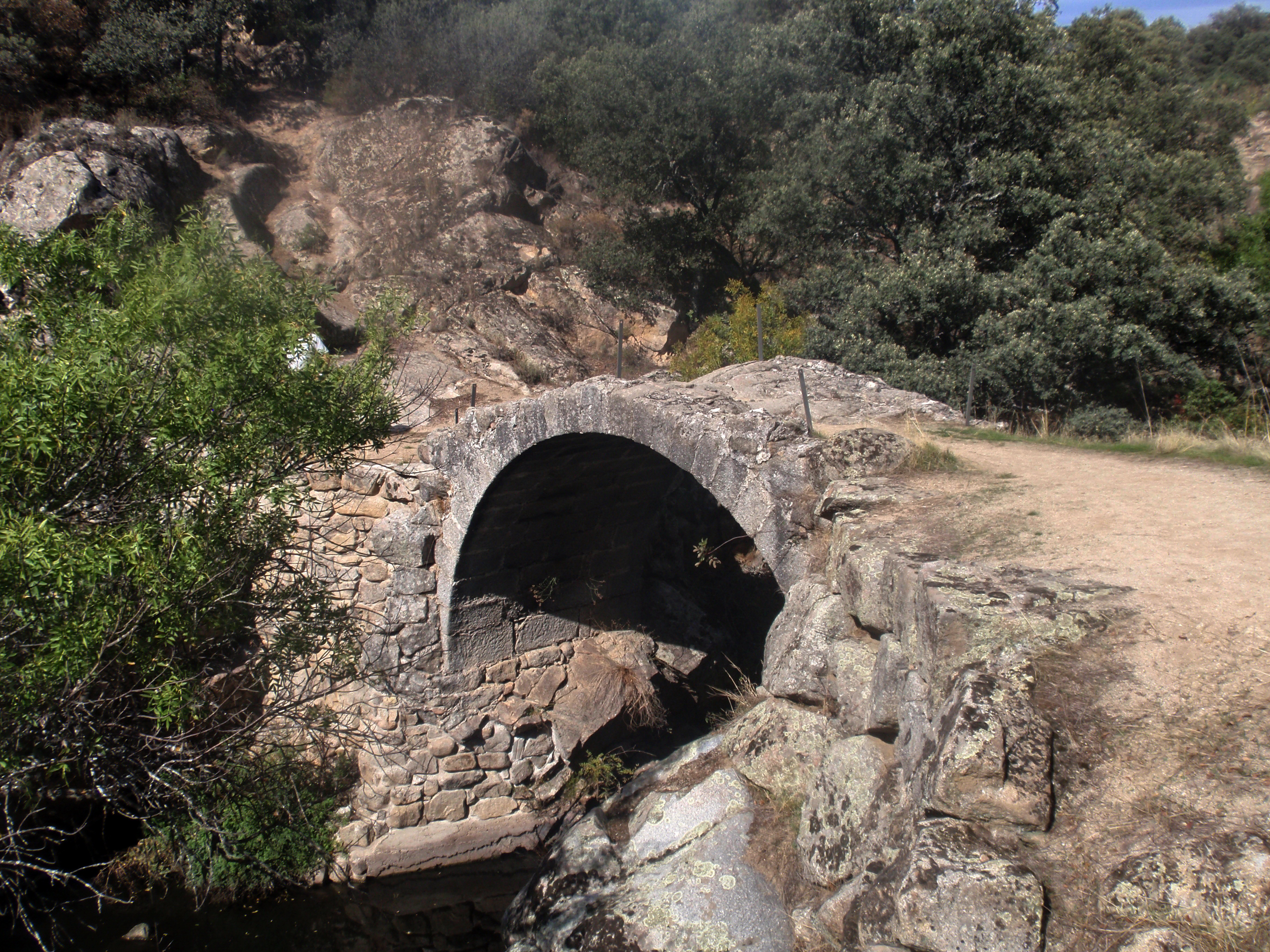 Puente medieval del Pasadero, sobre el río Perales. Navalagamella.